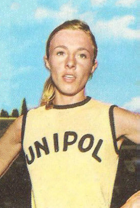 CAMPIONI DELLO SPORT PANINI 1970 1971 DONATA GOVONI ATLETICA LEGGERA